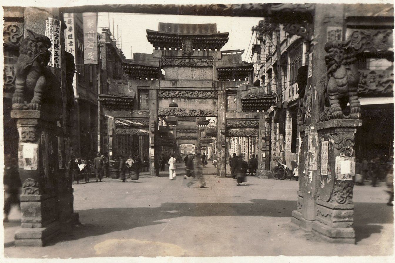 位於廣州中華中路的四牌樓（現解放中路一帶，其中四座已於文化大革命時期被毀）